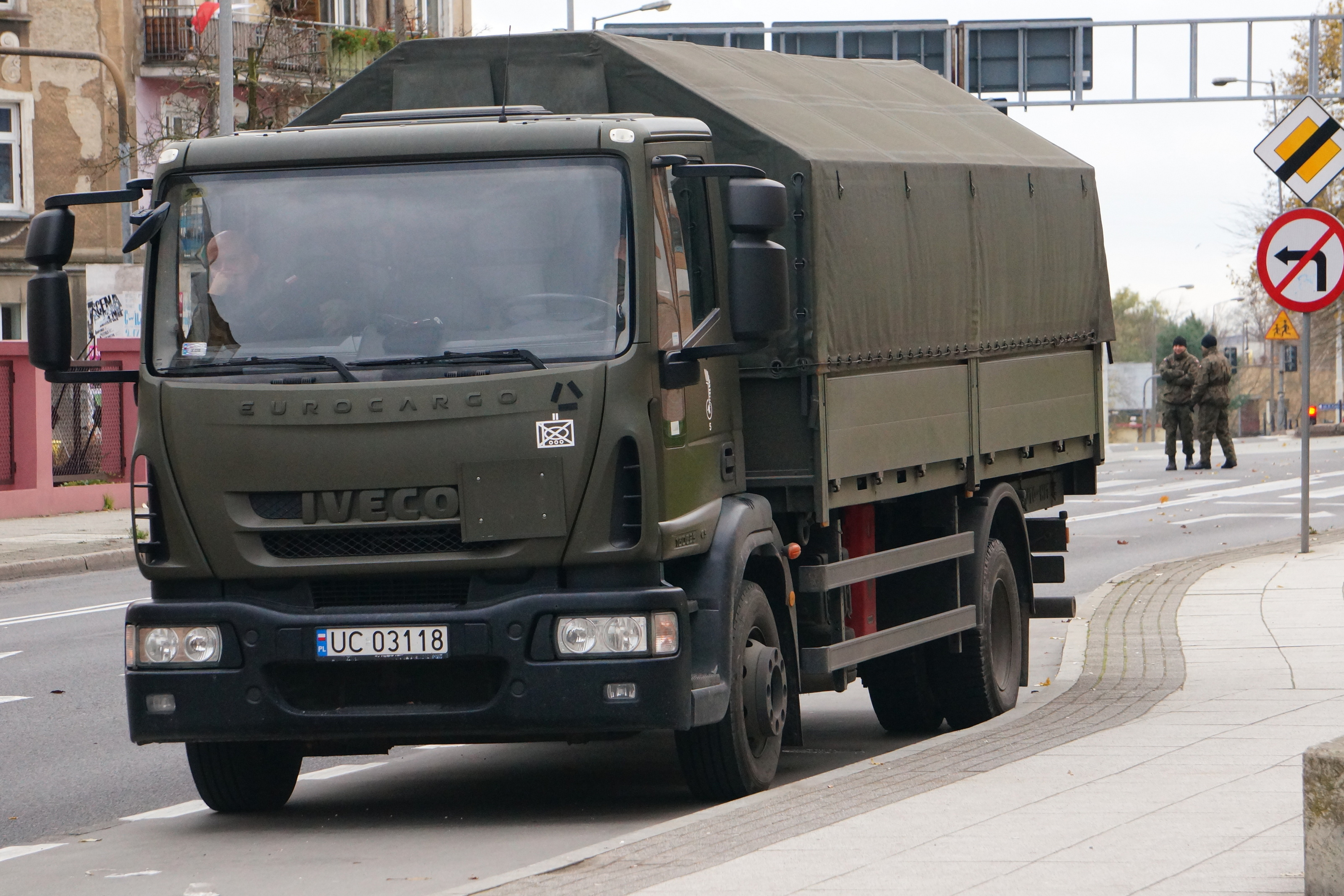 Gorzów Wlkp. ul. Estkowskiego. Iveco Eurocargo 160E25 (skrzyniowy) 17 Wielkopolskiej Brygady Zmechanizowanej